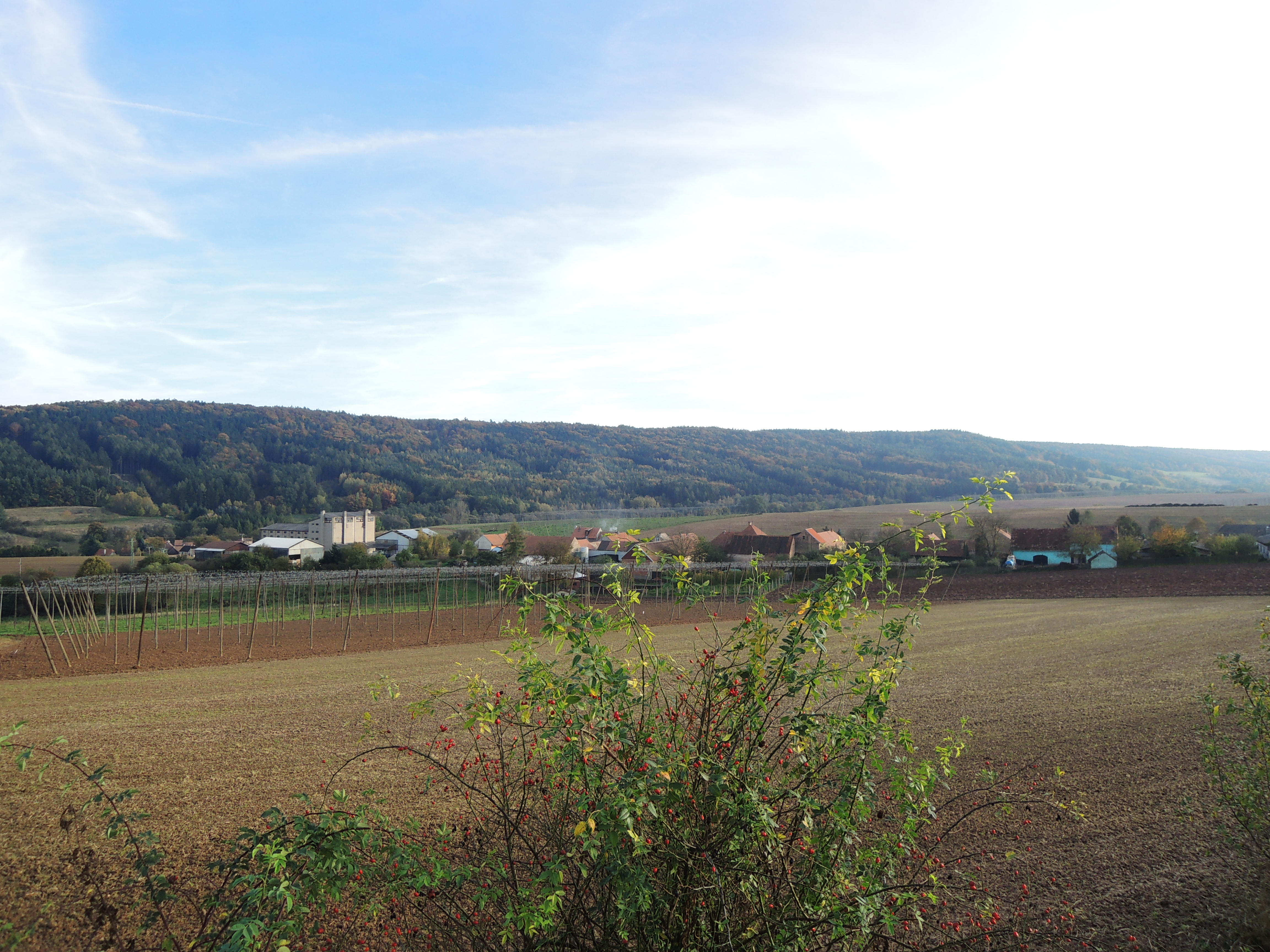 PR Pochválovská stráň, pohled přes Smilovice